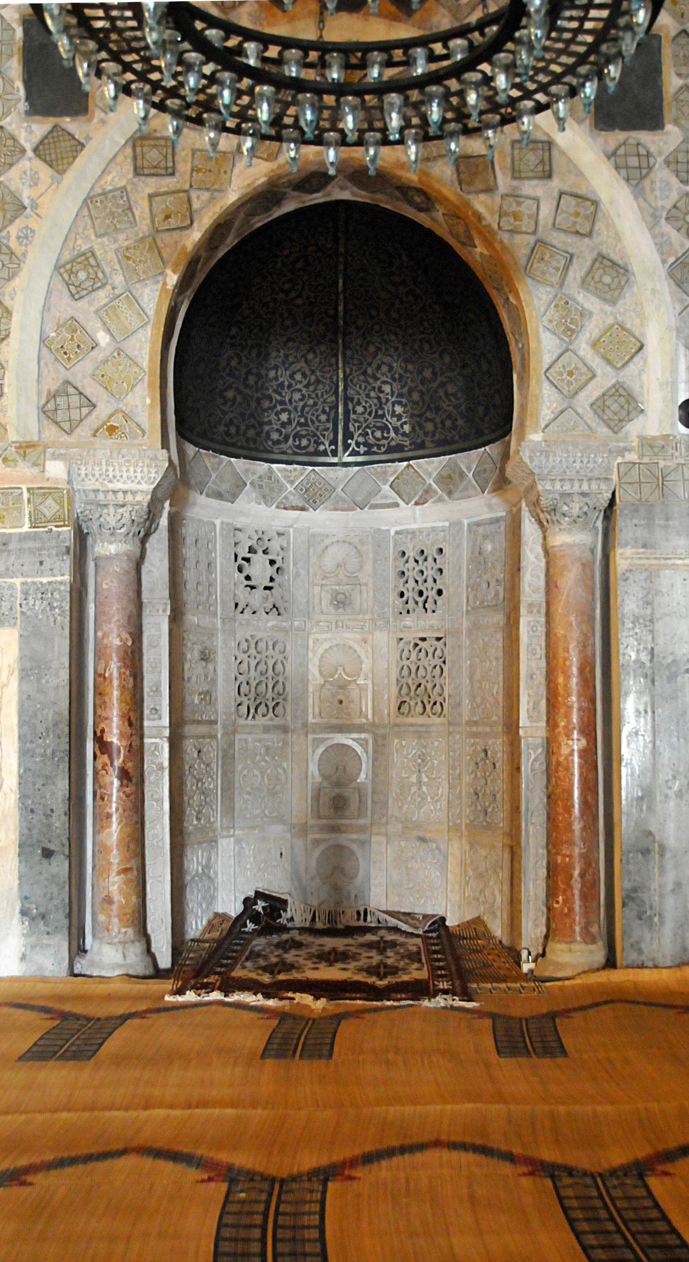 Gros plan du Mihrab de la Grande Mosquée de Kairouan